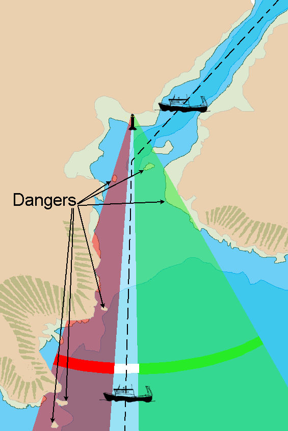 Schéma feu directionnel (entrée de la rivière Salcombe, Devon, Royaume Uni)